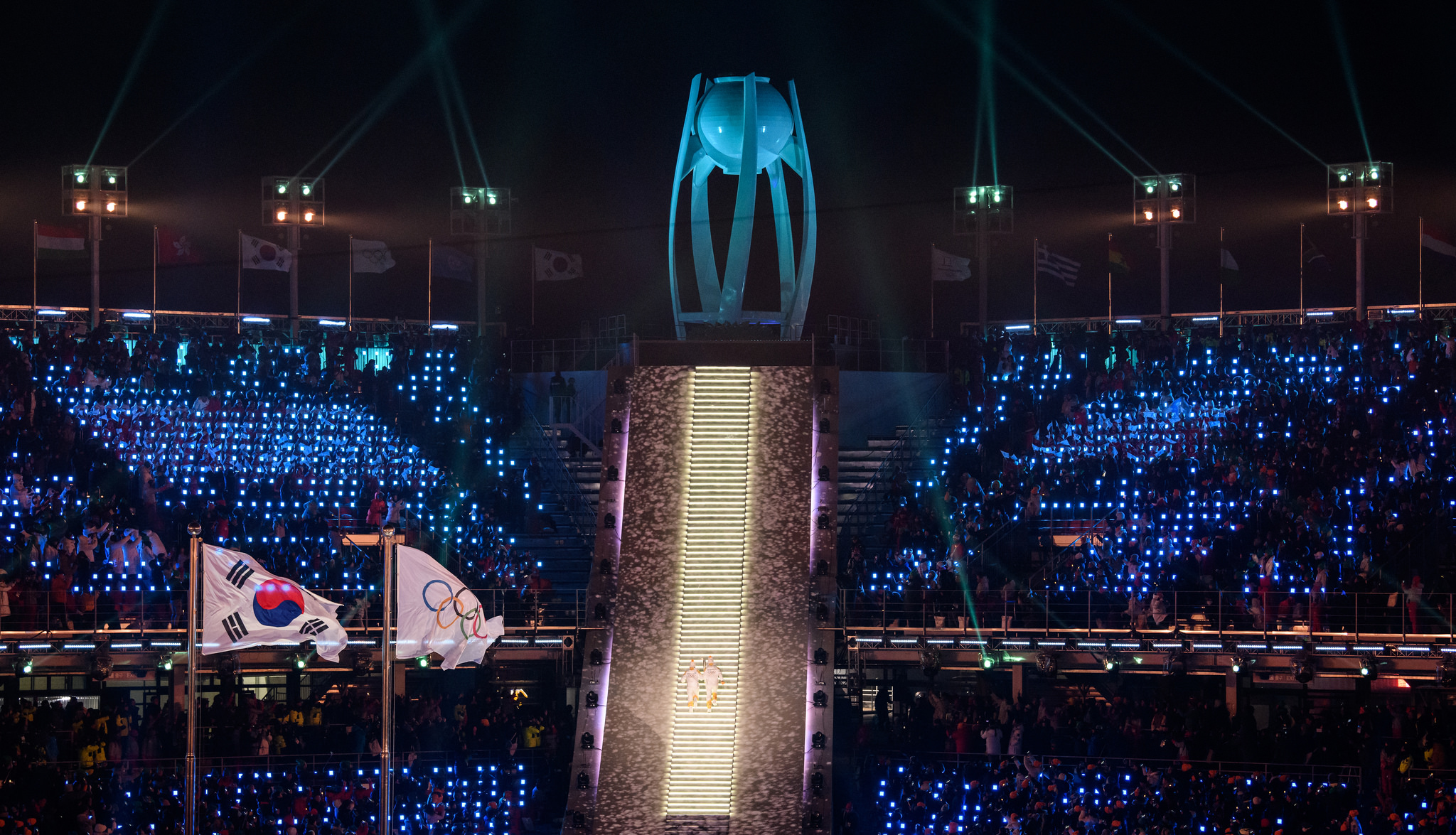 2018 PyeongChang Winter Olympic Games Opening Ceremony February 9, 2018 PyeongChang Olympic Plaza, Pyeongchang-gun, Gangwon-do